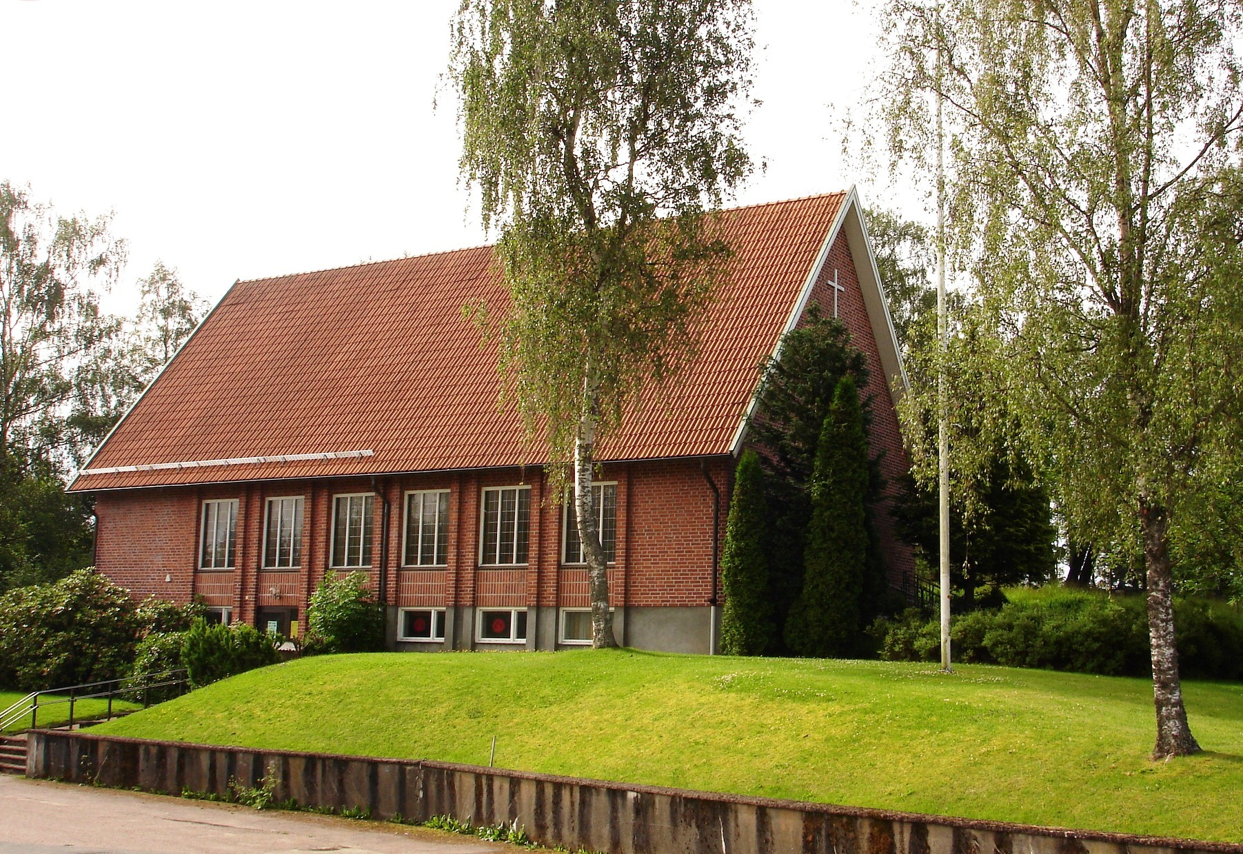 Sankt Andreas kyrka i Strömsnäsbruk i Markaryds kommun i Kronobergs län